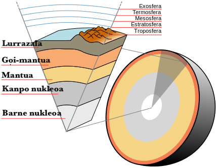 Lurraren barne-egiturako geruza desberdinak